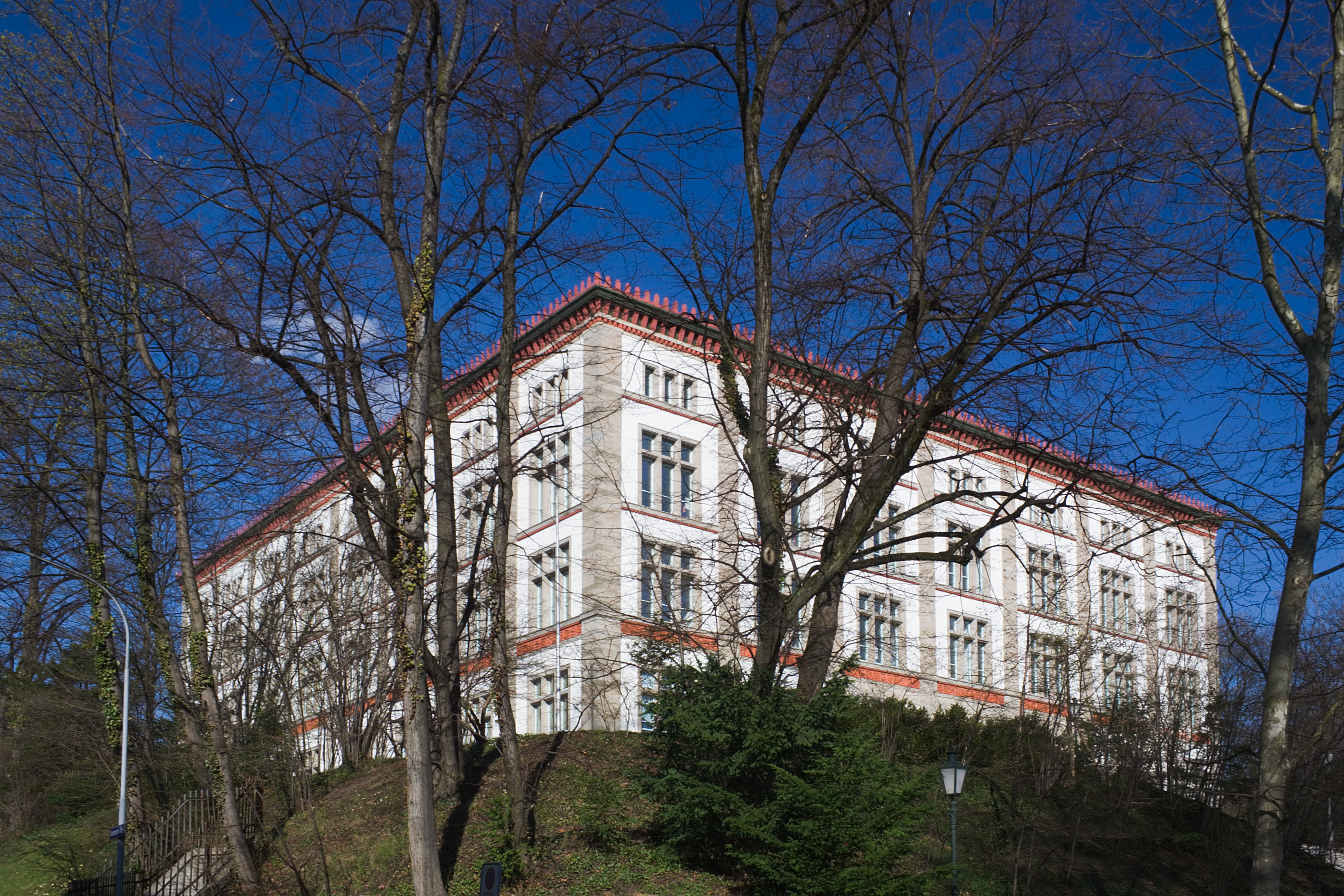 Die Kantonsschule Rämibühl von Gustav Albert Wegmann in Zürich, Schweiz. Historistisches Gebäude nach dem Vorbild der Berliner Bauakademie, vollendet 1842.